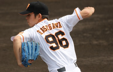 ジャイアンツ長谷川選手